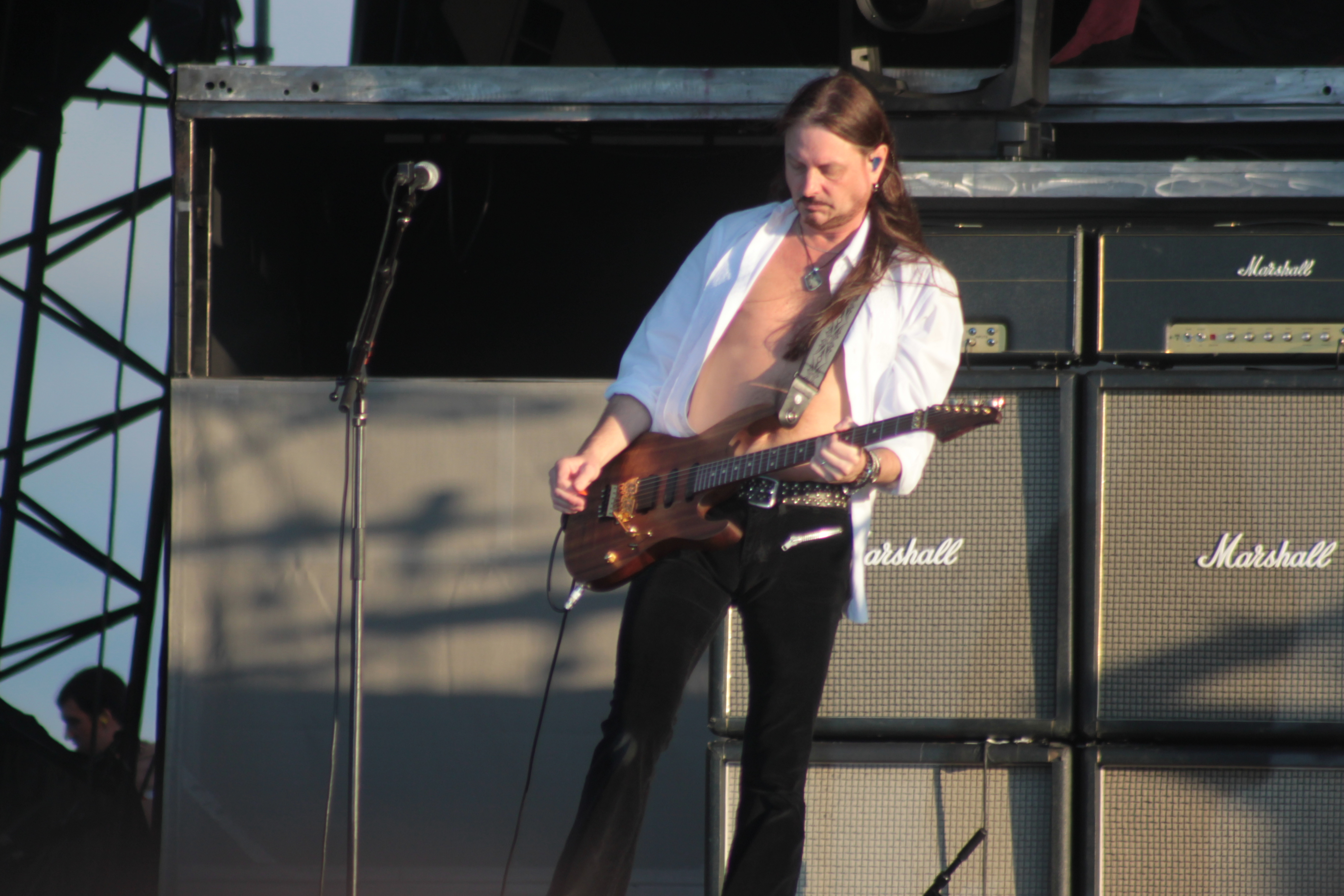 Reb Beach, Whitesnake, Hellfest 2013, Fr-44-Clisson.